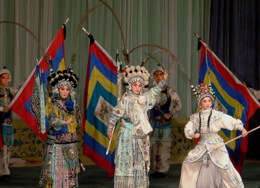 京剧《探谷·破敌》（左：杨七娘，中：穆桂英，右：杨文广）